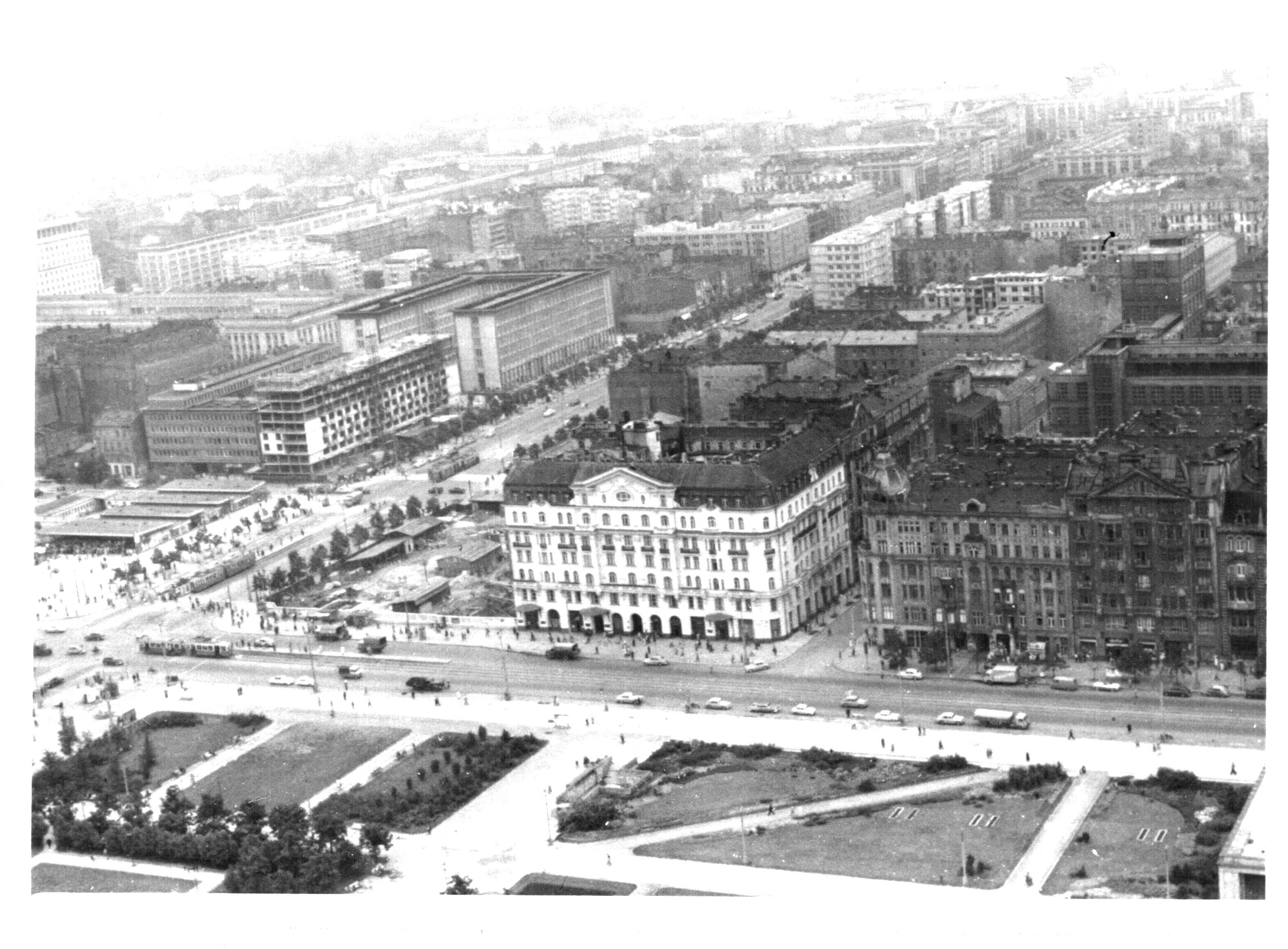 Varsói panoráma. A 12 képből álló felvétel sorozatot édesapám, Elekes Andor dr. készítette, aki 1960 -ban munkatársával, Dr. Szabó Istvánnal és édesanyámmal utazott Lengyelországba. Jártak Varsóban, Gdańskban, Gdyniában, Sopotban és a Hel félszigeten. A készített papír képek mérete: 12 cm x 9 cm. Varsó (1-4), Gdańsk (4-8), Gdynia (9), Sopot (10), Hel félsziget (11,12). ©© Derzsi Elekes Andor, Budapest, 2014, A kép és filmfelvételek egészben, vagy részletekben másolását, bármilyen úton történő sokszorosítását és felhasználását a szerző ellenérték nélkül, jogutódjaira is kihatóan megengedi. Az engedély kiterjed a kereskedelmi célú hasznosításra is. Kéri azonban nevének feltüntetését a felhasználás során. A Metapolisz sorozat valamennyi képe és filmje Creative Commons alatti valamint kereskedelmi - for profit - célra is felhasználható. Ajánlott hivatkozás: Derzsi Elekes Andor: Metapolisz DVD line Források: Hungarocamion gépjárművezetők szolgálati szabályzata lektorálta Dr. Szabó István 1983